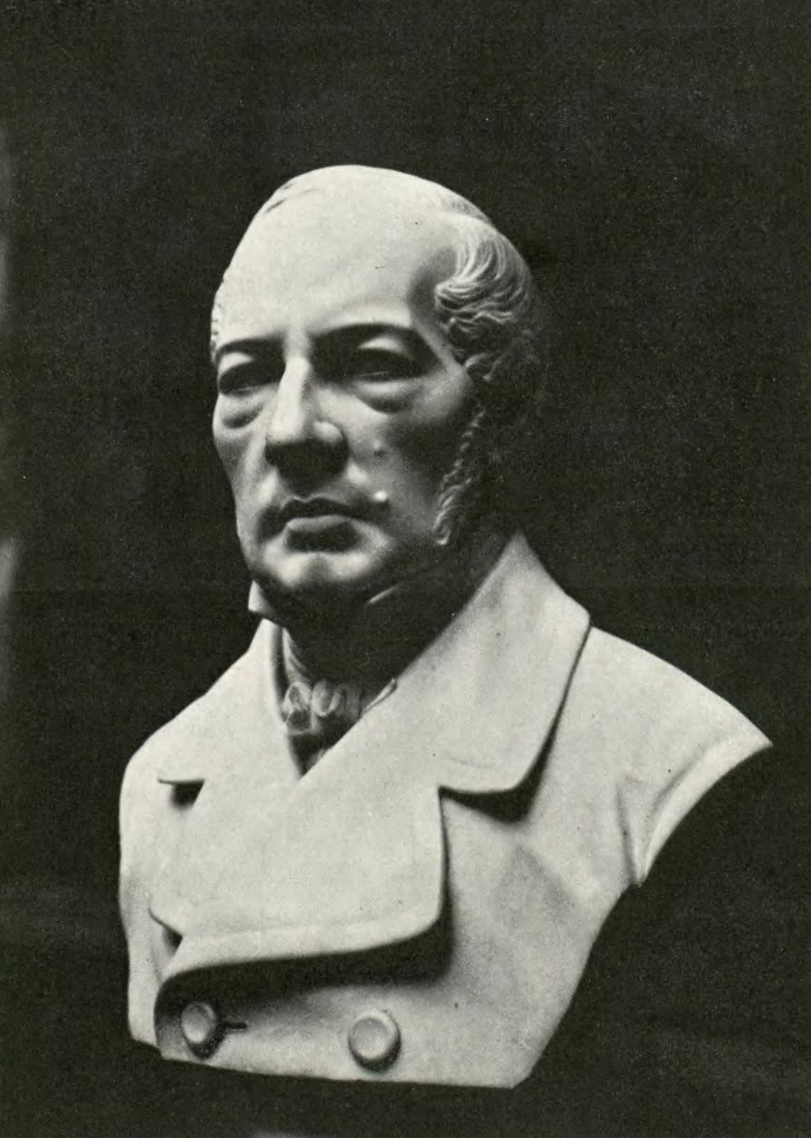 Edward Rastawiecki